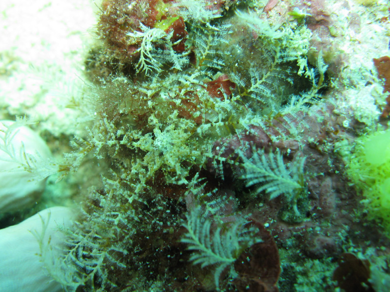 Dorometra nana sobre escombro en la base de la ladera del arrecife, diámetro de 8 cm, isla Lizard, Australia